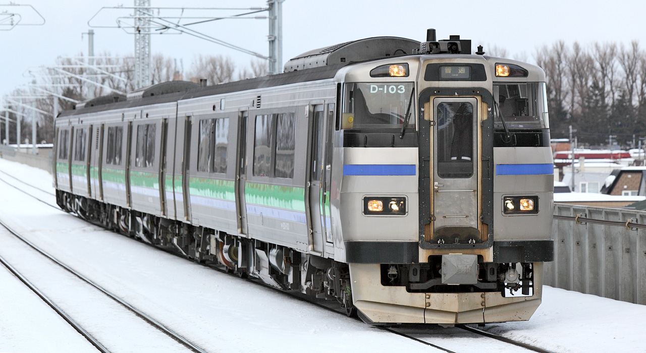 JR Hokkaido Kiha 201 series DMU (Taihei Stn. - Shin-Kotoni Stn.)